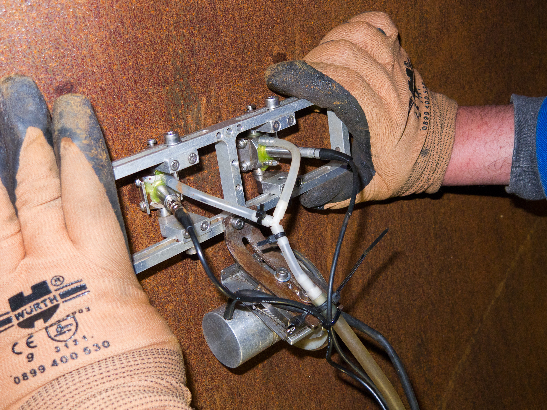 Manuell geführtes Meßkopf-Paar bei einer TOFD-Prüfung